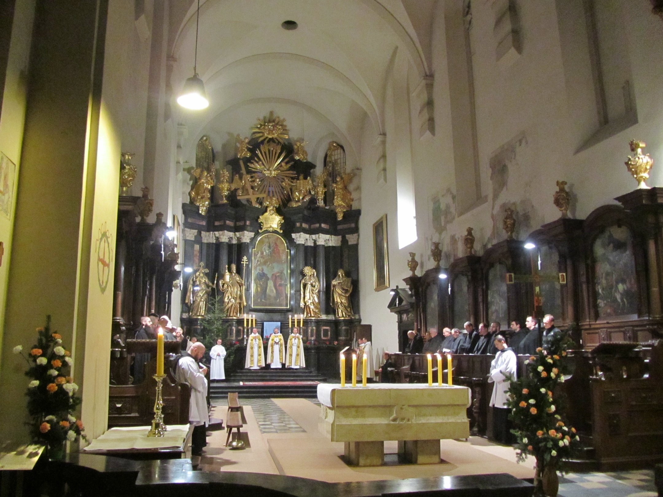 tyniecnieszpory